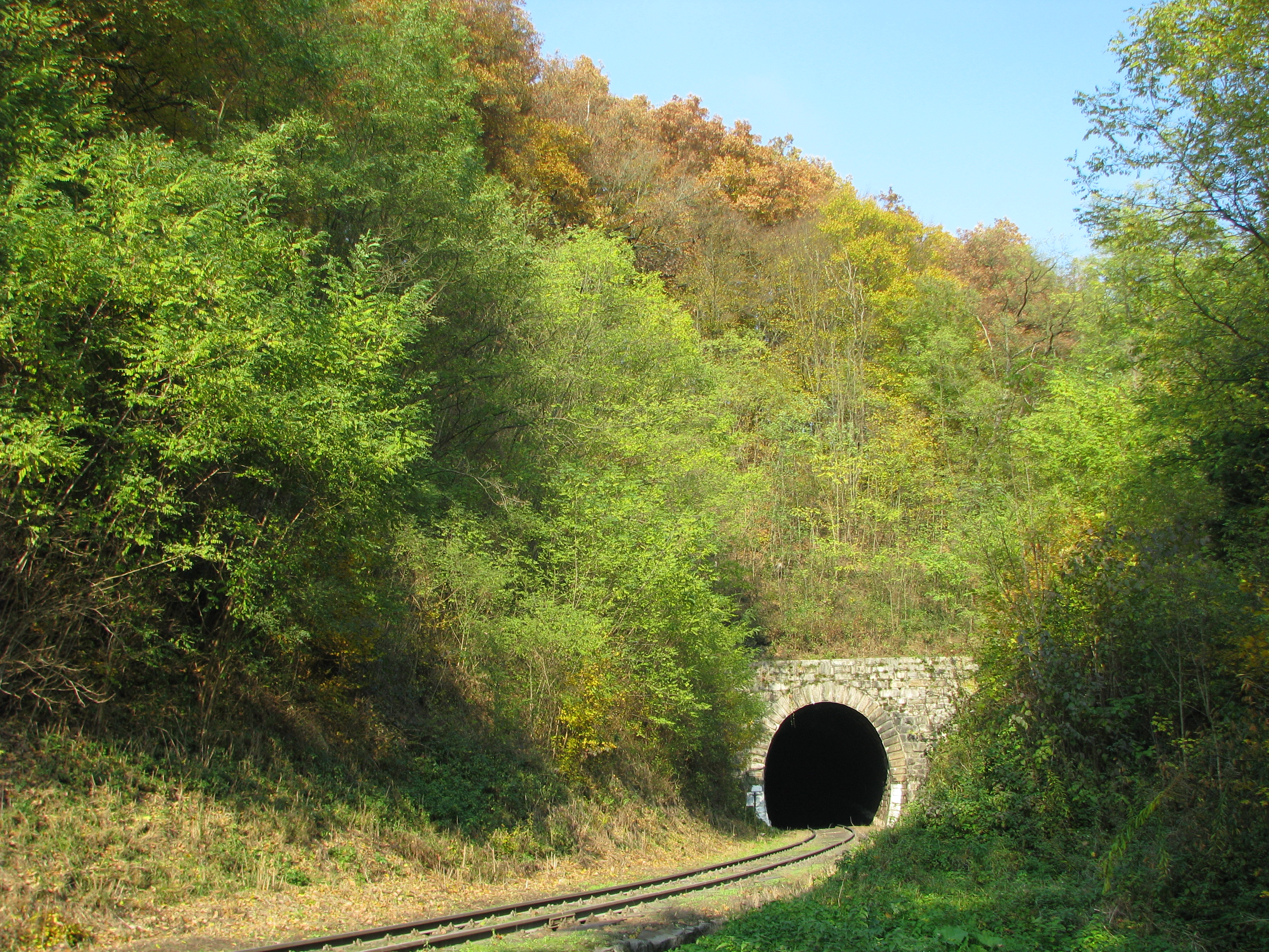 Akátové porosty v okolí železničního tunelu tratě Borač-Doubravník (PR Sokolí skála)